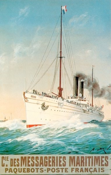 Affiche messageries maritimes Alexandre Brun